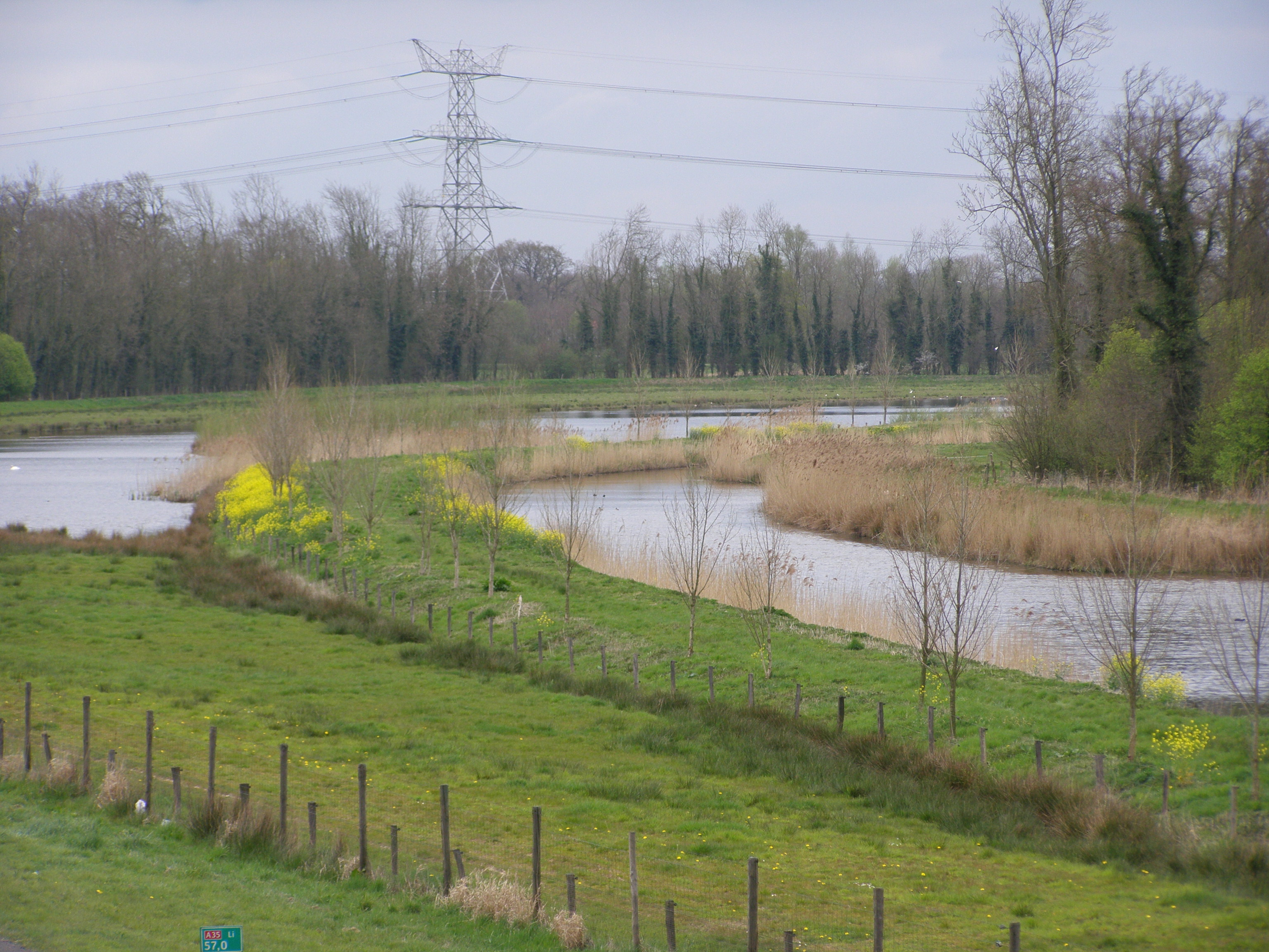 eigen werk. Gezicht op het retentiegebied Woolde ten westen van Hengelo